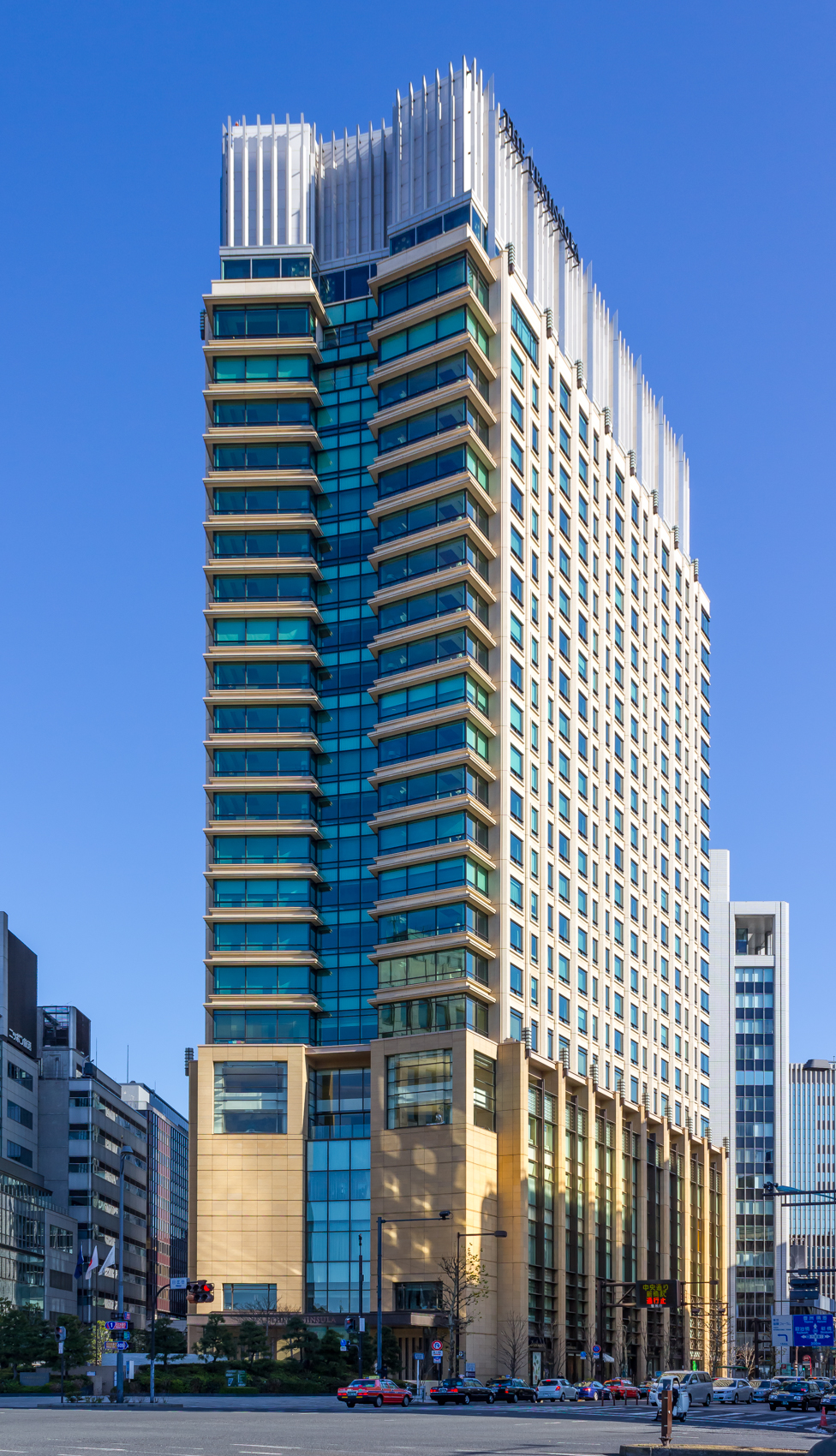 ペニンシュラ東京（千代田区）